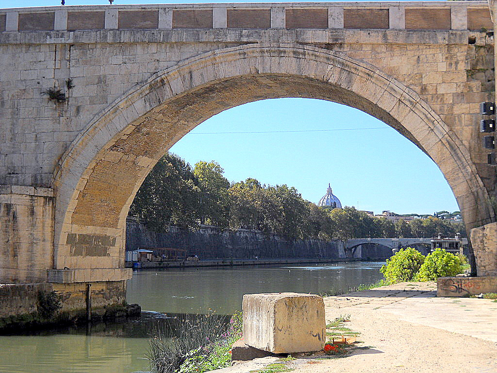 Roma Ponte Sisto